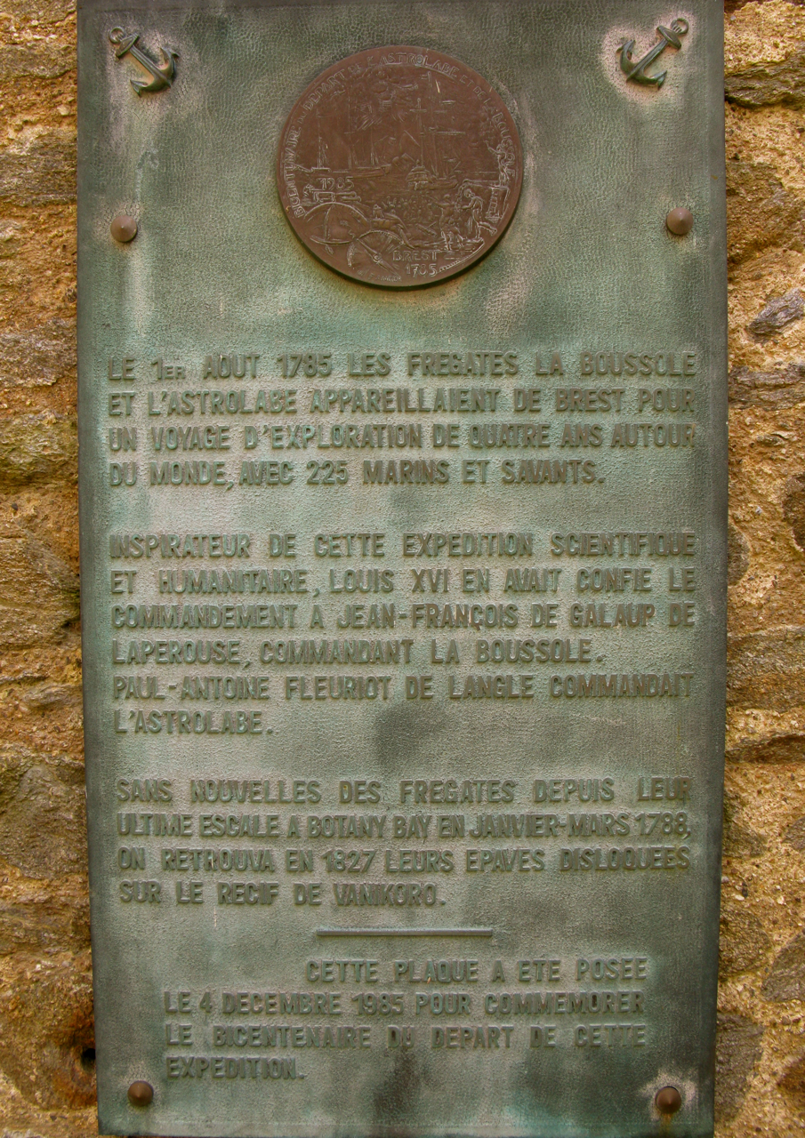 Plaque commémorative de La Pérouse - Brest (France)